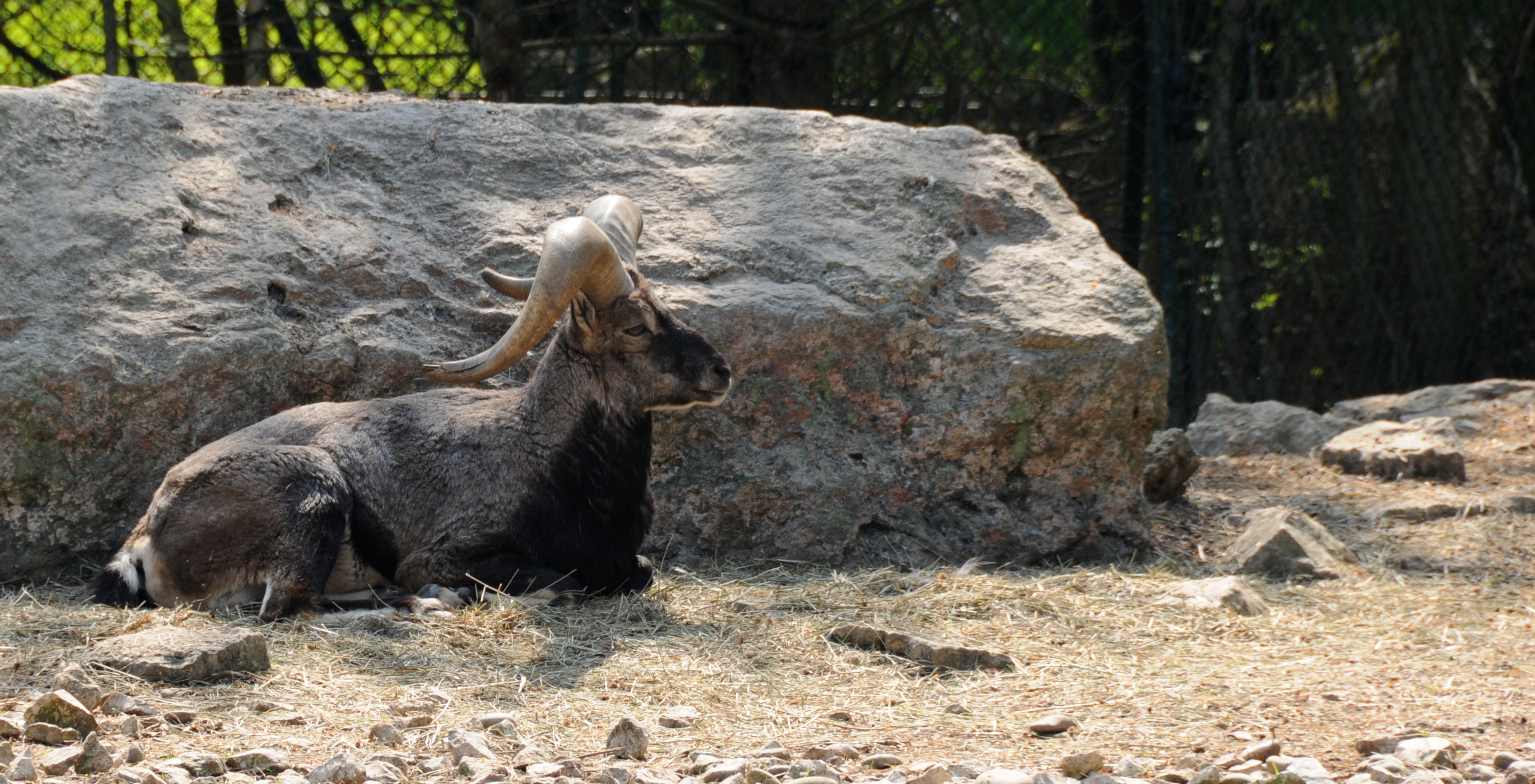 Pseudois nayaur